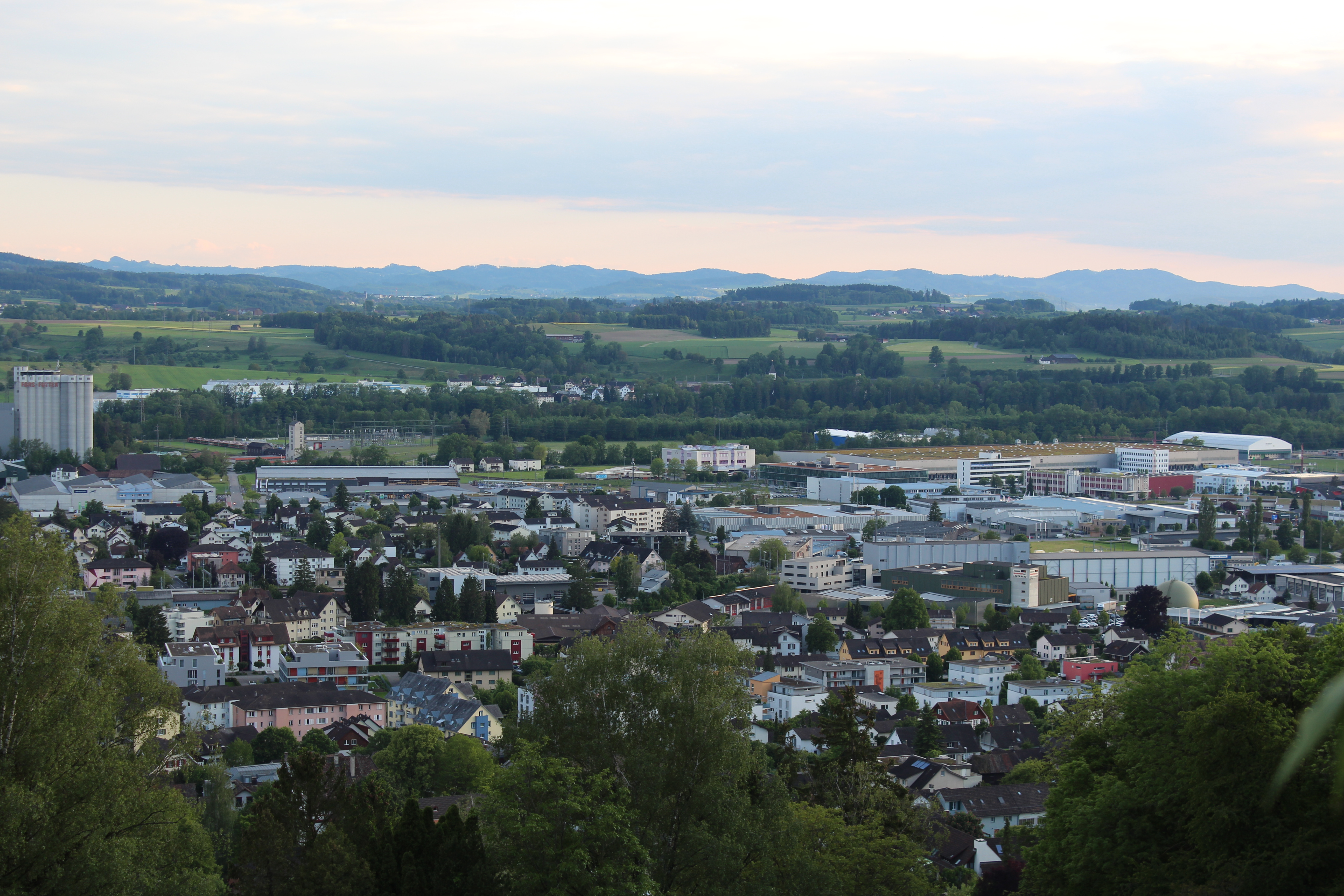 Industriegebiet Weinfelden